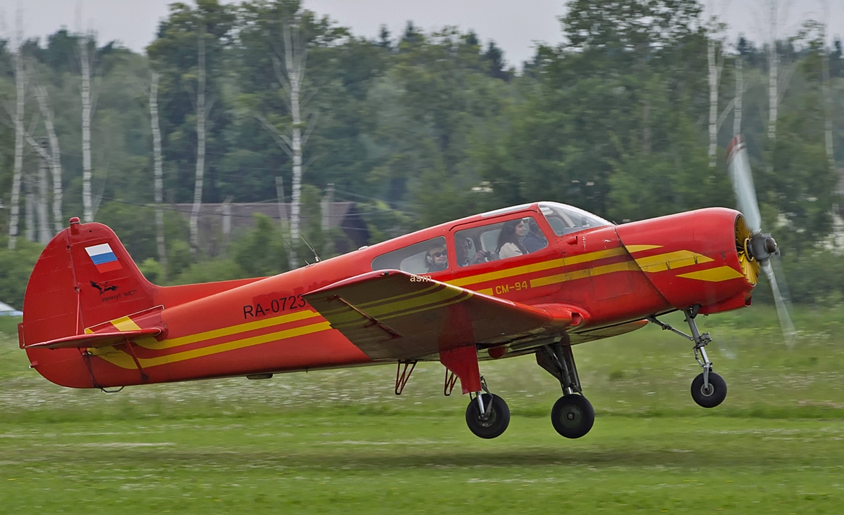 Tehnoavia SM-94 RA-0723G